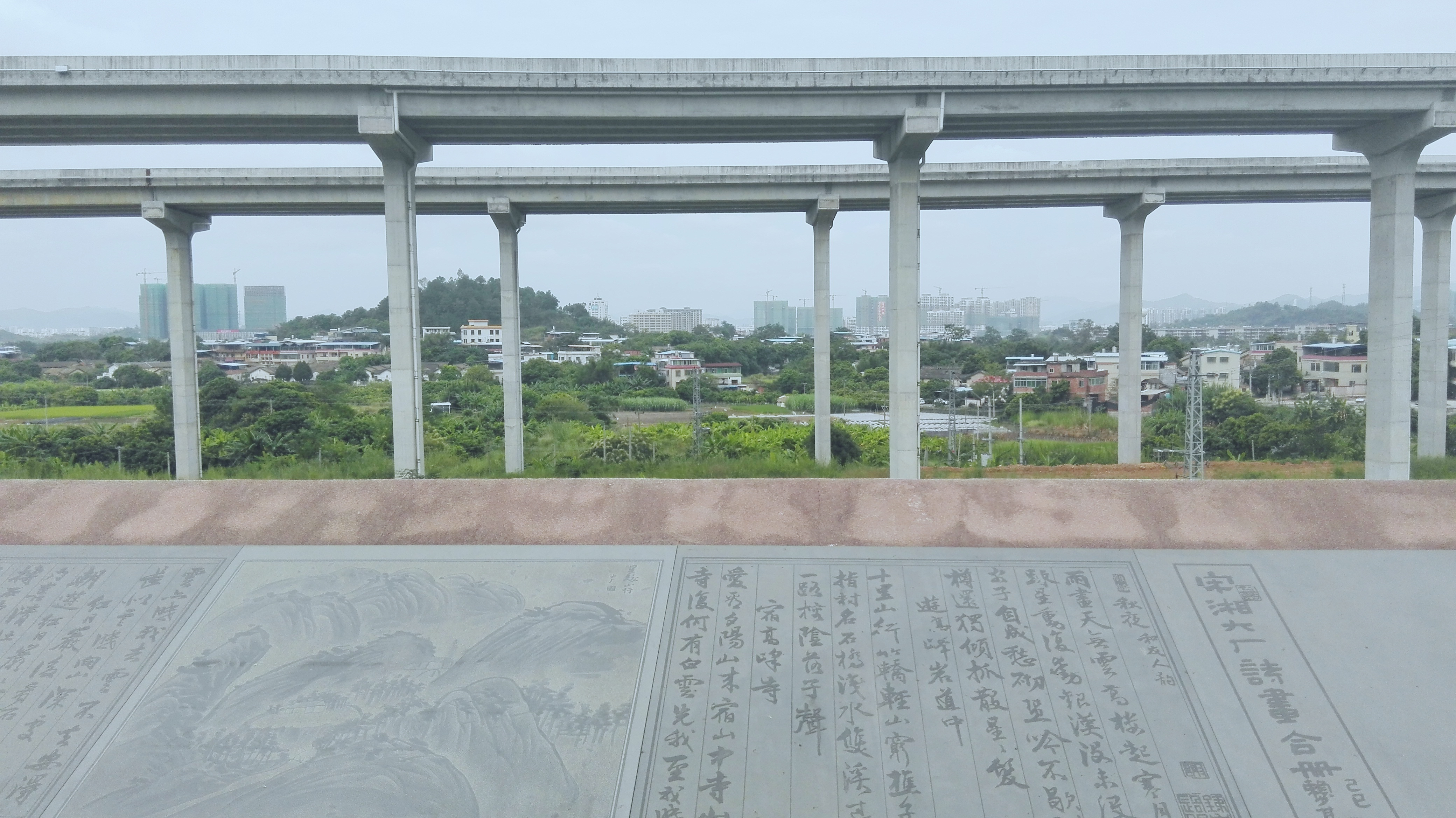 从梅江区泮坑度假村远望的梅江区农村景象和高速公路